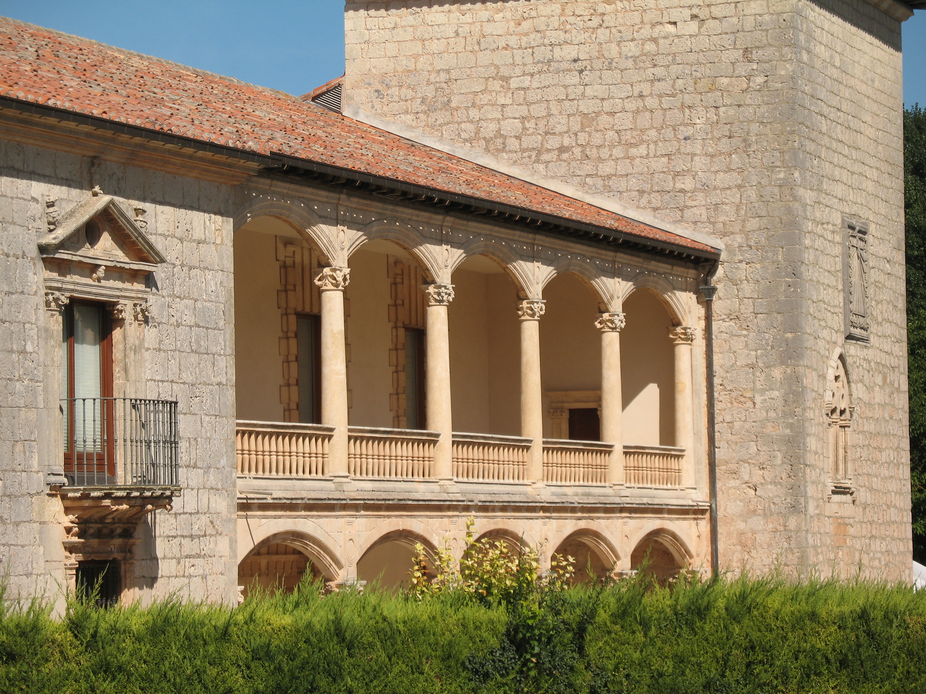 Galería sobre la entrada